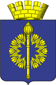 Герб города Фролово. Номер в Геральдическом регистре РФ: 4647